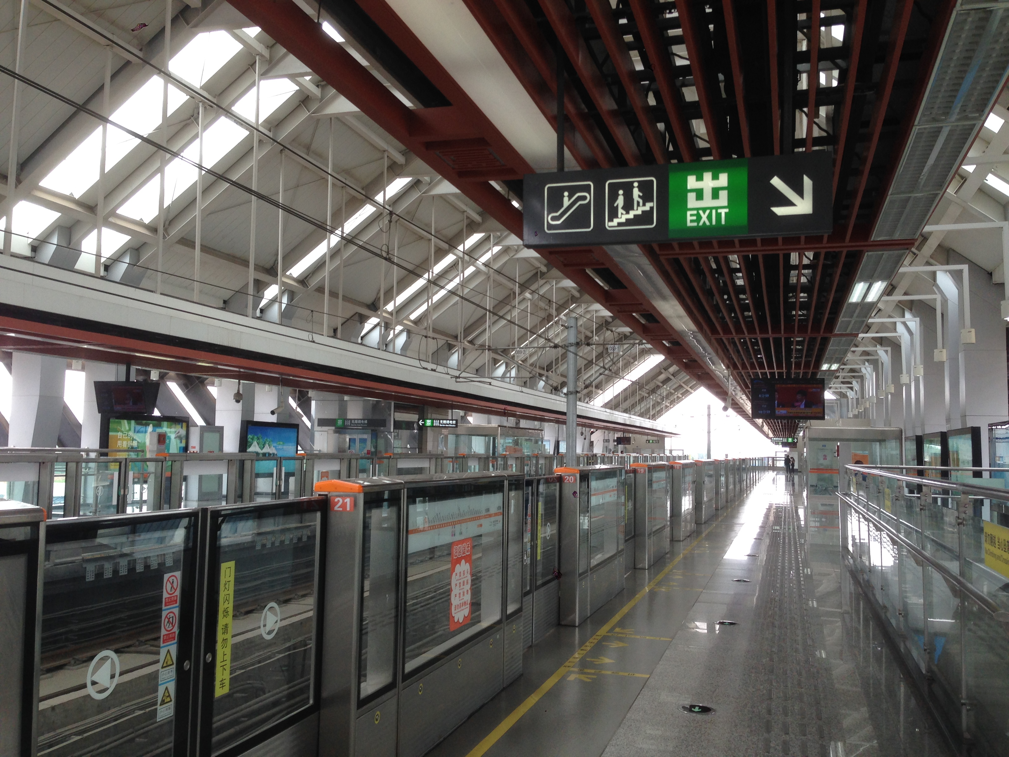 成都地铁2号线大面铺站站台